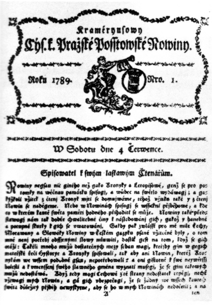 První číslo Krameriusových cís. k. pražských poštovských novin ze 4. července 1789. Od roku 1791 se nazývaly Krameriusovy císařské královské vlastenecké noviny.